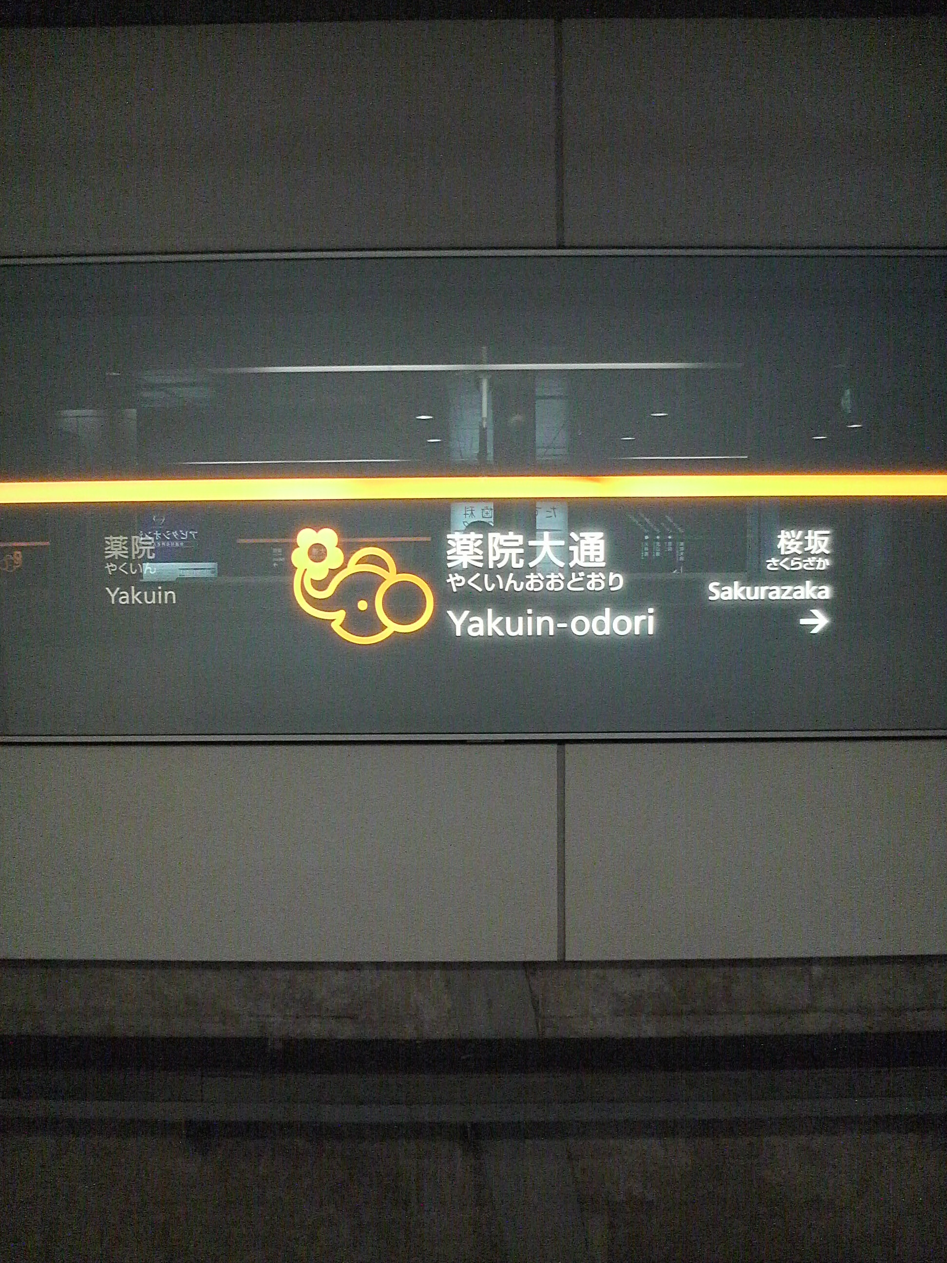 福岡市地下鉄七隈線薬院大通駅の駅名標